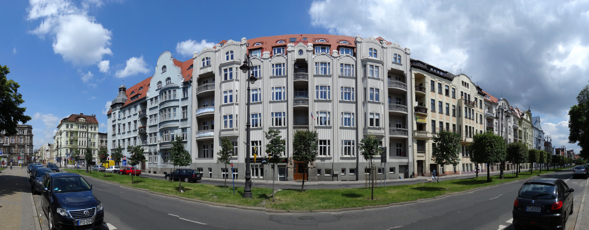 Północna pierzeja alei Adama Mickiewicza w Bydgoszczy